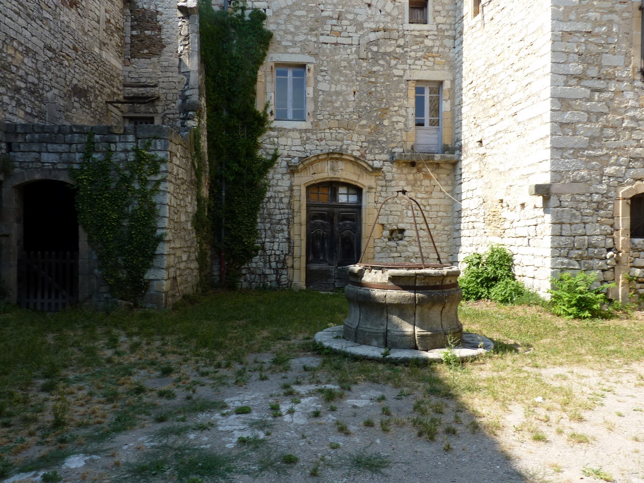 La cour intérieure et le puits de la commanderie de Jales (Ardèche)